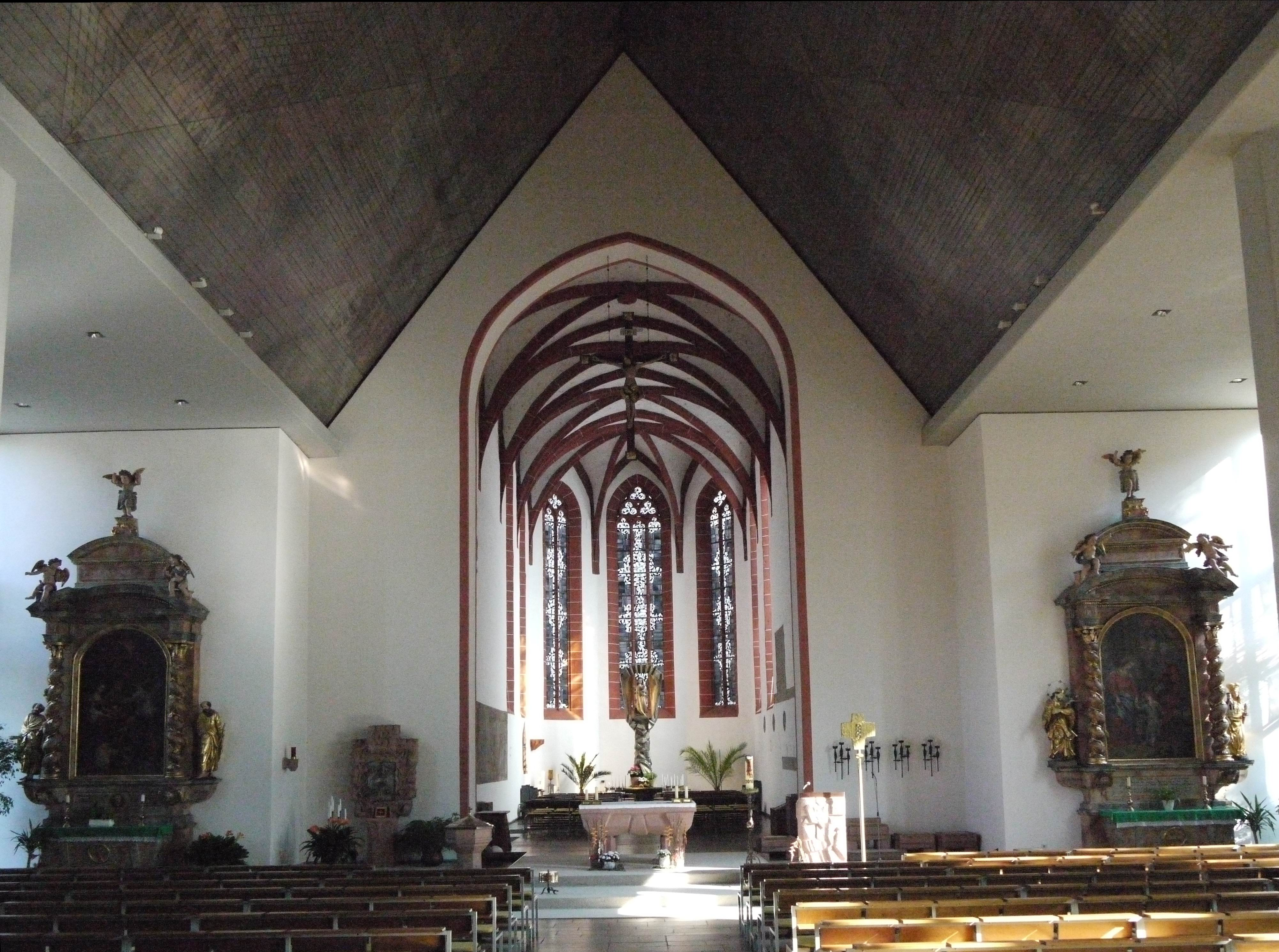 Kirchenraum von Maria im Grünen Tal